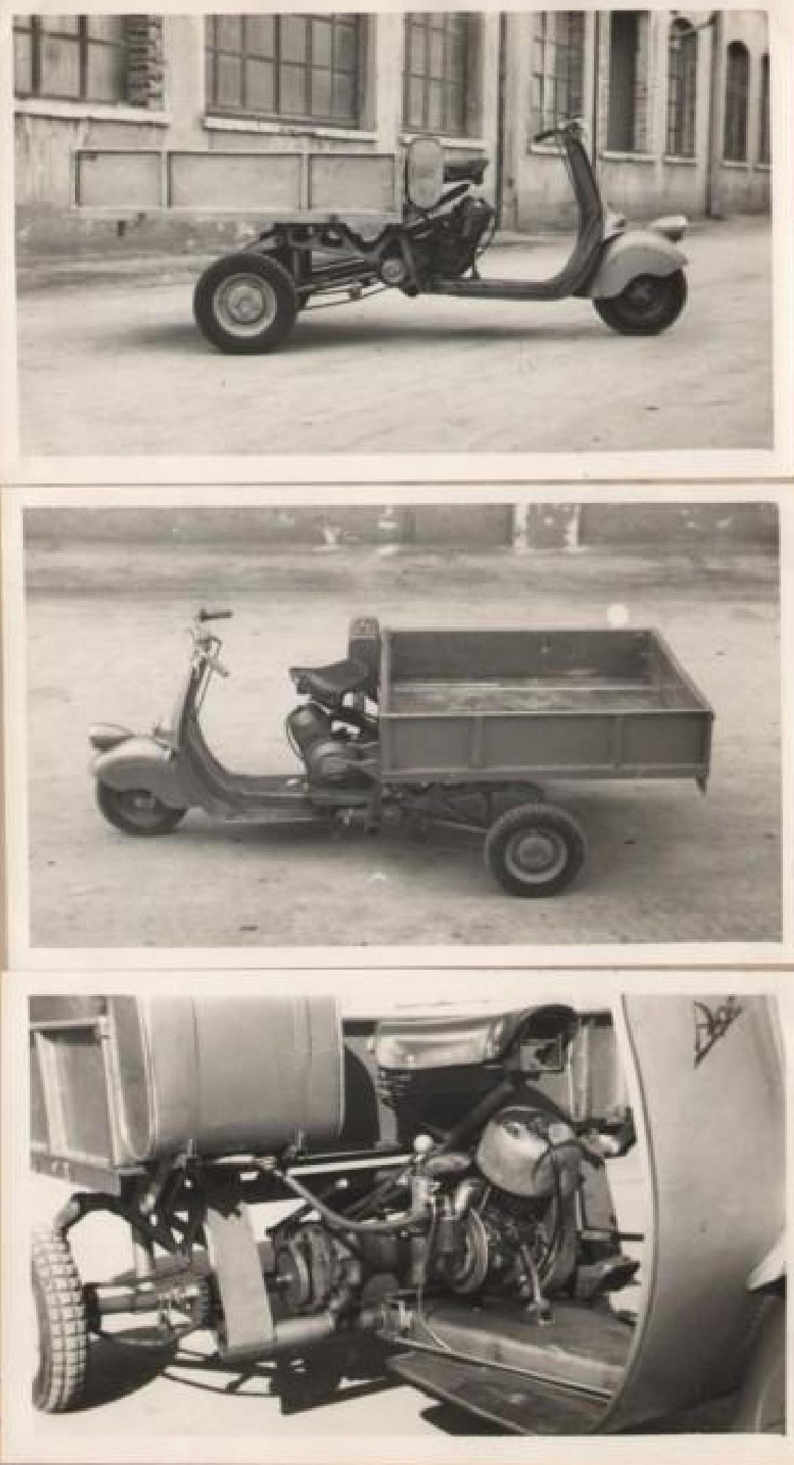 Relazione tecnica sulle caratteristiche del motofurgone Ape, Piaggio 1948. Alla Fiera di Milano del 1946 l'Ape riscosse molto successo e, grazie anche al suo basso costo, ebbe ampia diffusione nell'Italia meridionale del secondo dopoguerra (AS Pescara, Archivio privato D'Ascanio Corradino, b. 7, fasc. 157, n. 238)